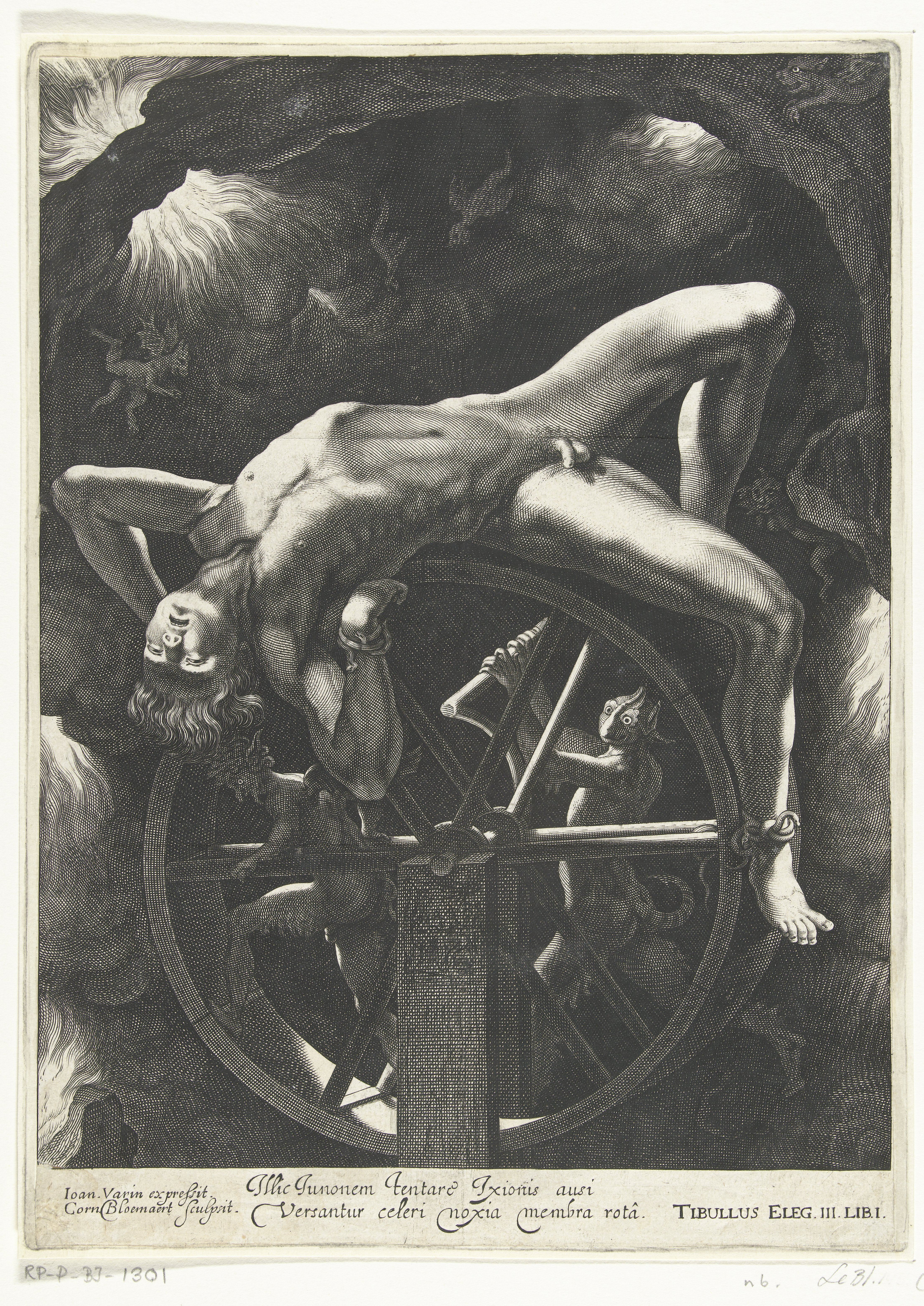 IdentificatieTitel(s): Ixion op het radObjecttype: prent boekillustratie Objectnummer: RP-P-BI-1301Opschriften / Merken: verzamelaarsmerk, verso, gestempeld: Lugt 2228Omschrijving: Ixion heeft zijn schoonvader vermoord en ondergaat zijn straf in de Hades. Voor straf werd hij op een vurig, altijd brandend Wie: l gebonden. Het wiel wordt draaiende gehouden door centauren. Met een vers in het Latijn.VervaardigingVervaardiger: prentmaker: Cornelis Bloemaert (II) (vermeld op object)uitgever: Jean Warin (II) (vermeld op object)Plaats vervaardiging: Parijs (mogelijk)Datering: 1655 - 1700Fysieke kenmerken: gravureMateriaal: papier Techniek: graveren (drukprocedé)Afmetingen: blad: h 258 mm × b 188 mmToelichtingIllustratie van een uitgave van Michel de Marolles, Tableux du Temple des Muses. Niet afkomstig uit de uitgave Paris, N. Langlois, 1655, die beschreven staat in Hollstein en Le Blanc.OnderwerpWat: Ixion on a burning wheelVerwerving en rechtenVerwerving: overdracht van beheer 1816Copyright: Publiek domein